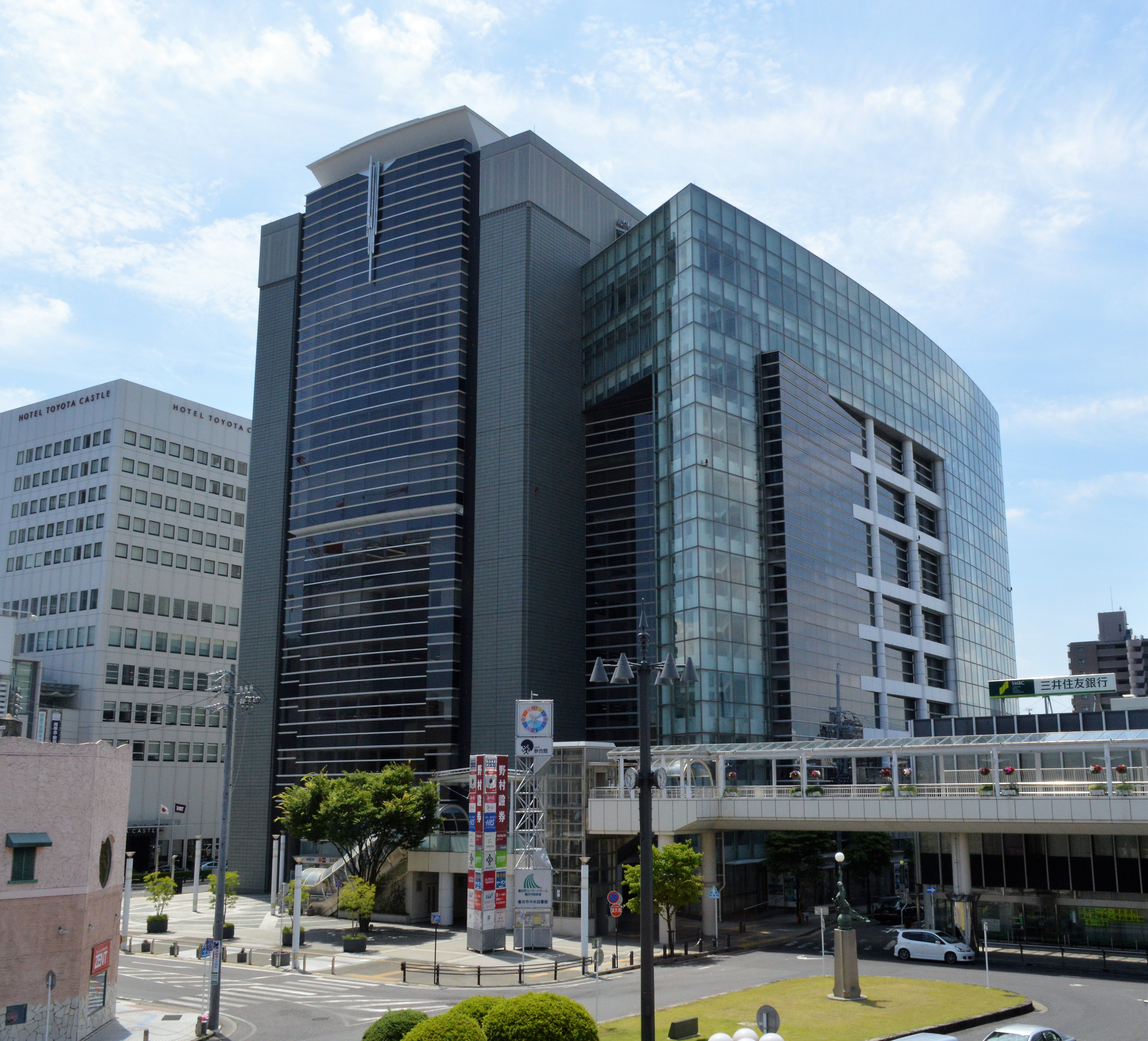 愛知県豊田市のとよた参合館。豊田市中央図書館などが入っている。